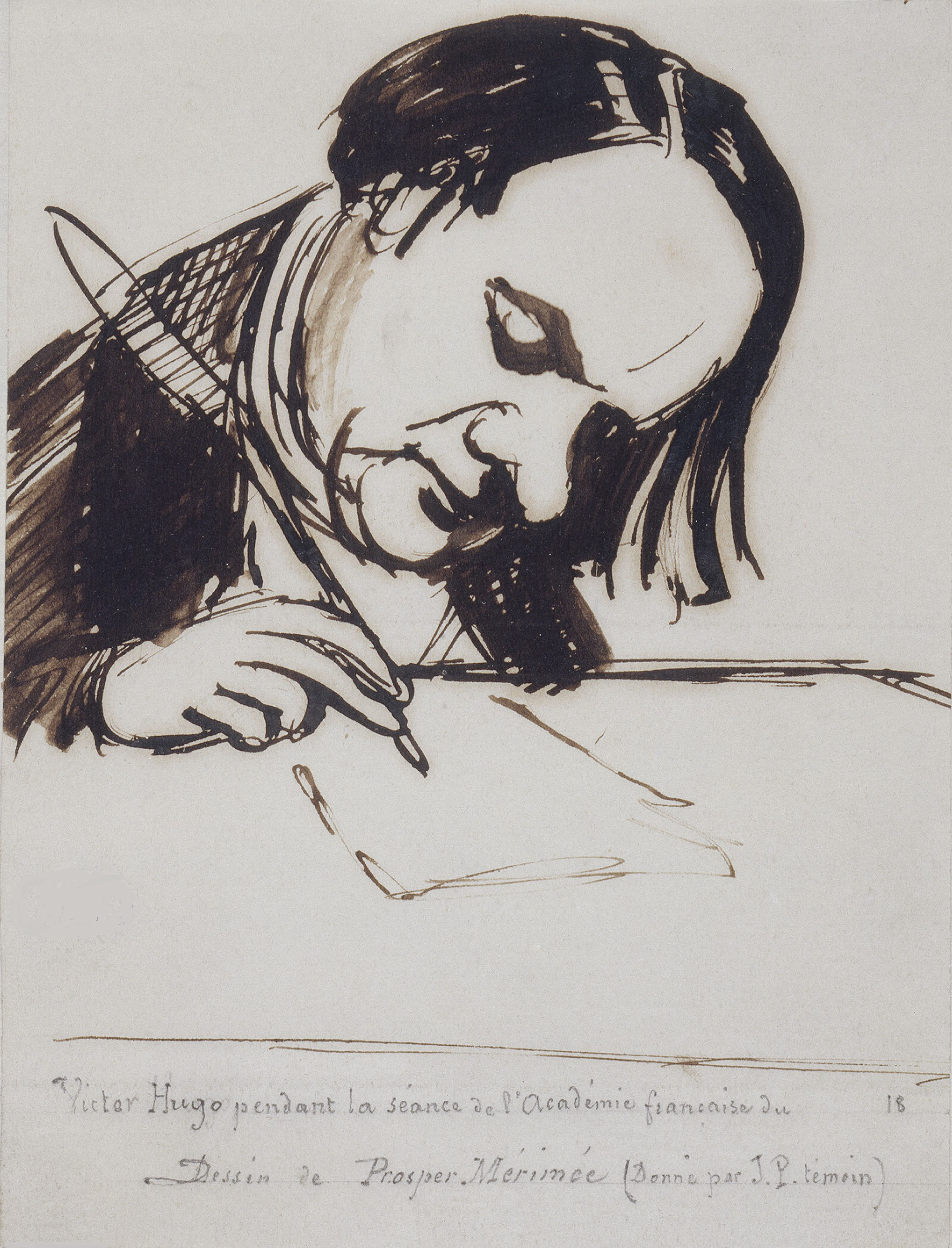 Victor Hugo, dessin de Mérimée